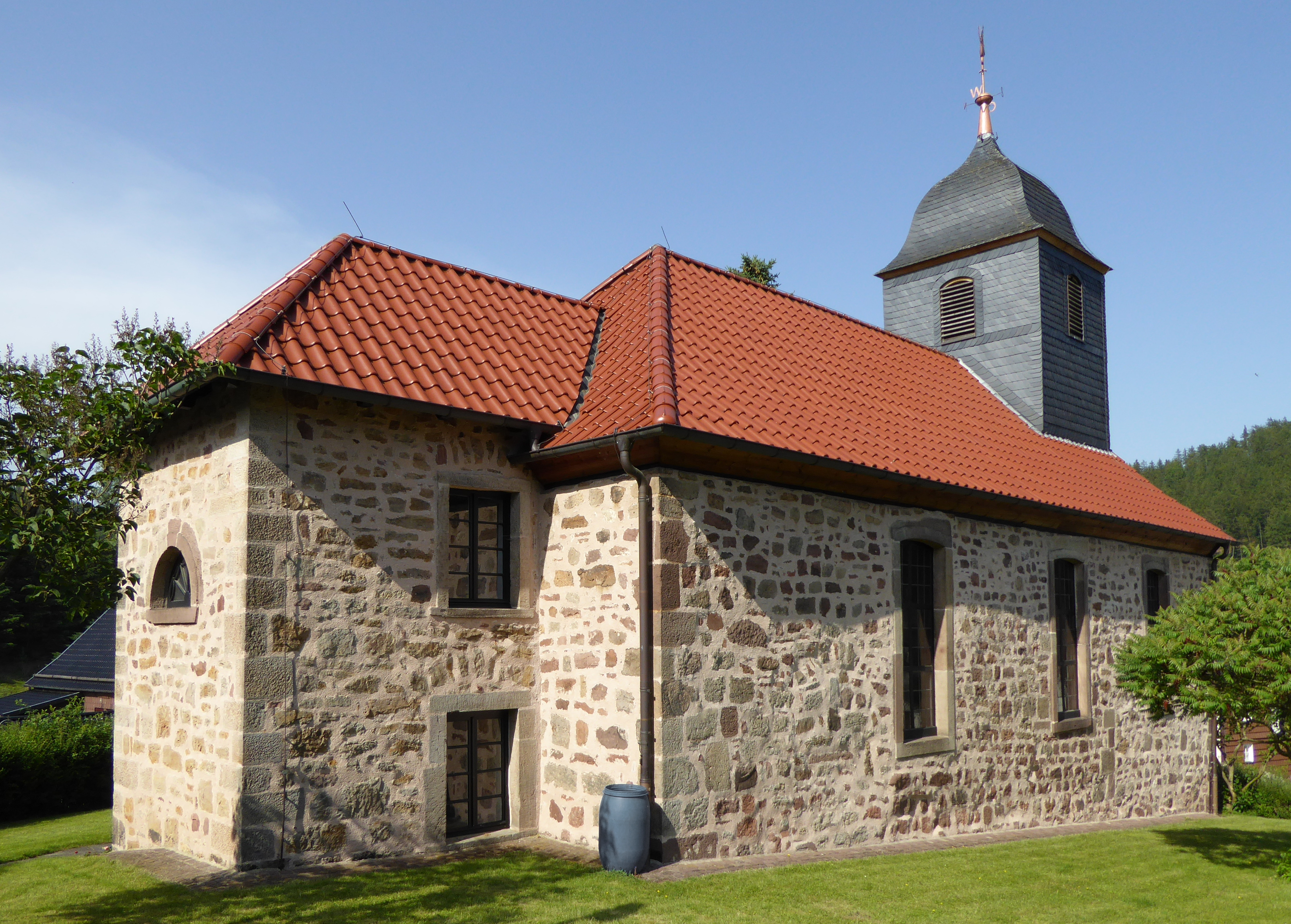 Evangelische Kirche in Ziegenhagen, Stadt Witzenhausen, Werra-Meißner-Kreis, Nordhessen